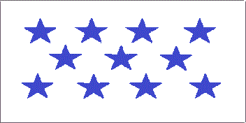 Version libre de la bandera del Partido Guanacaste Independiente, la original puede ser ligeramente distinta